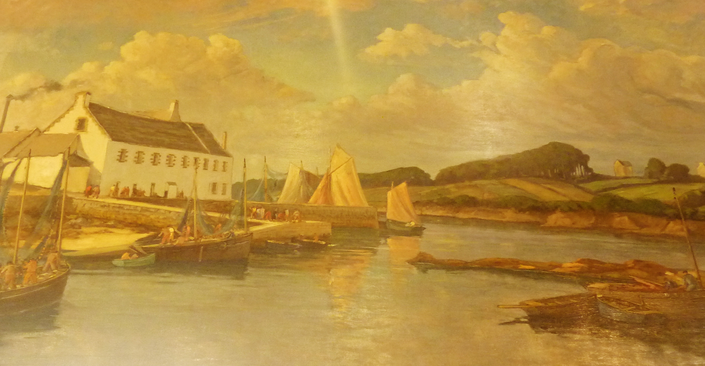 Gaston Pottier : Le guet et l'anse de Port Rhu (halles de Douarnenez)